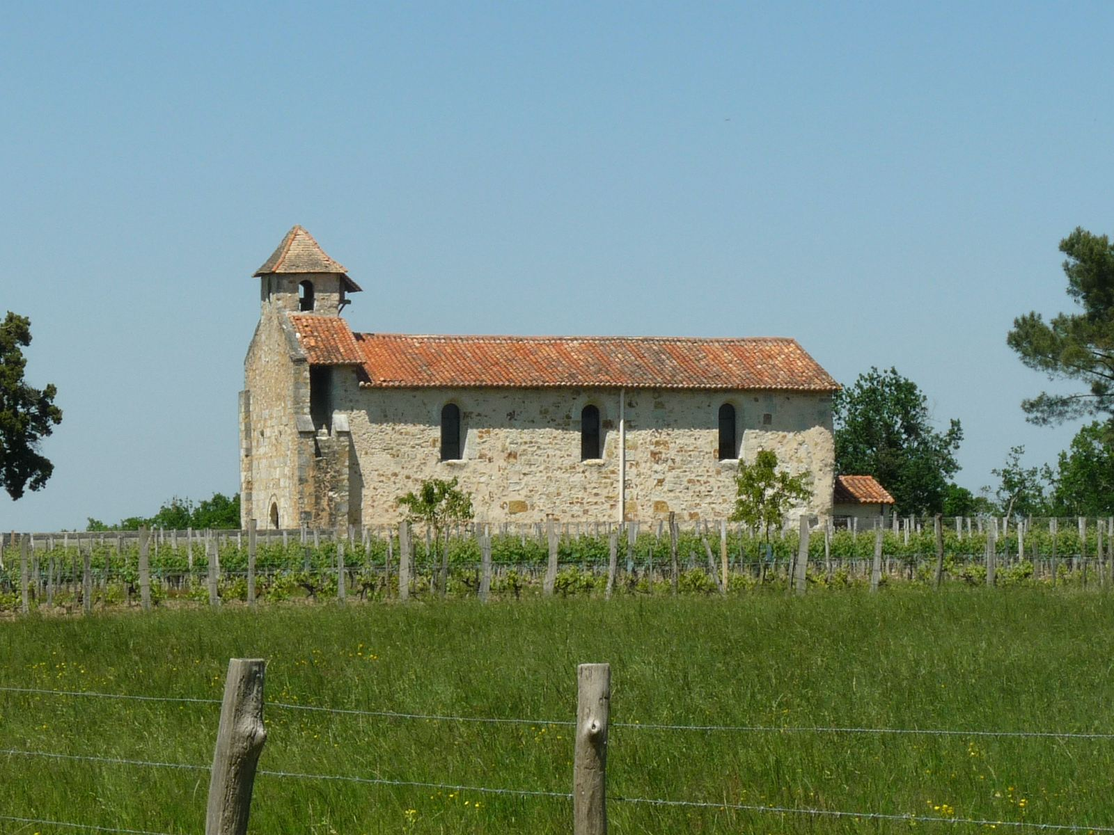 église de Puymangou, Dordogne, France